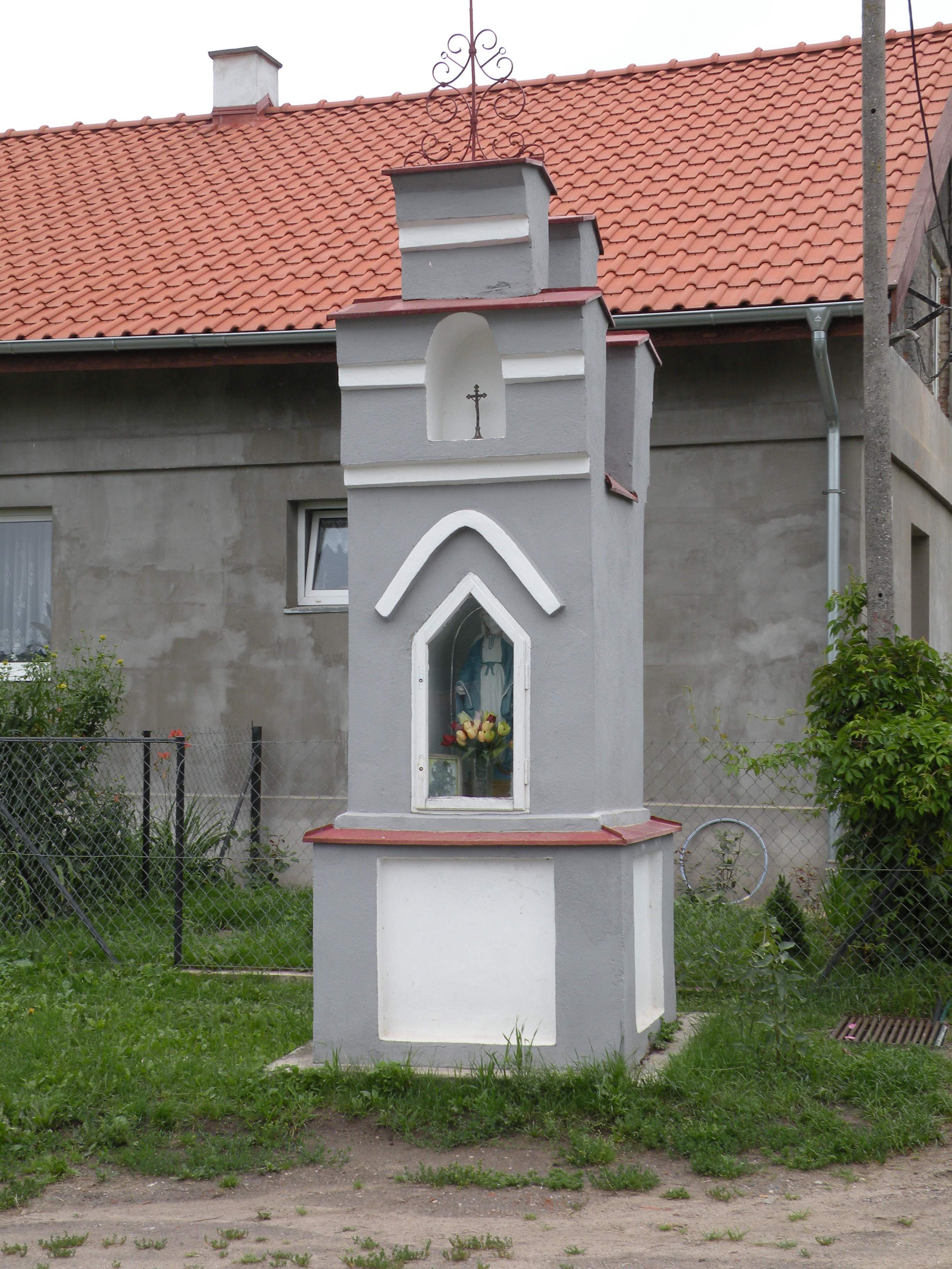 Rzeck koło Biskupca